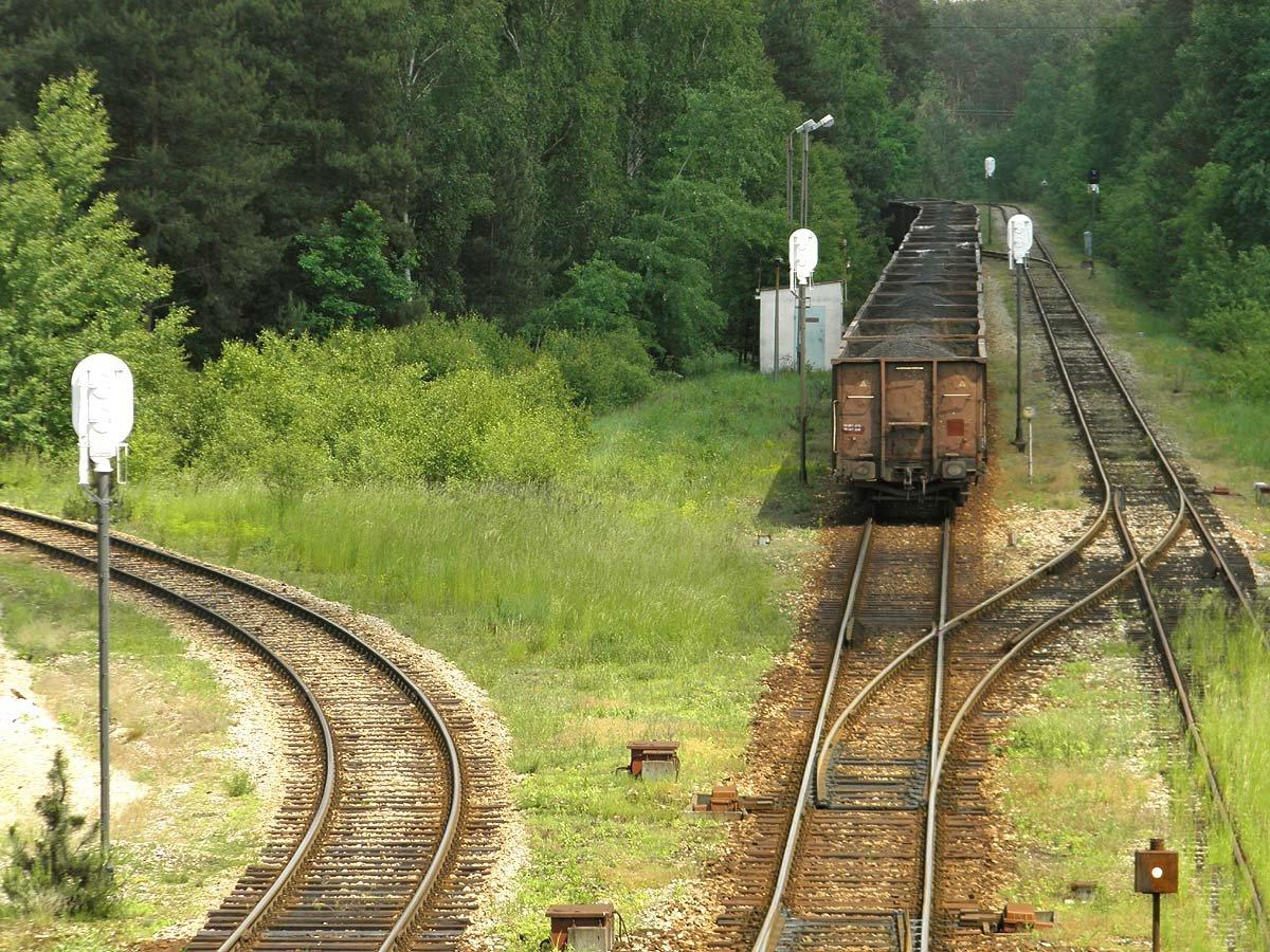 Torowiska prowadzące do Elektrowni Kozienice.